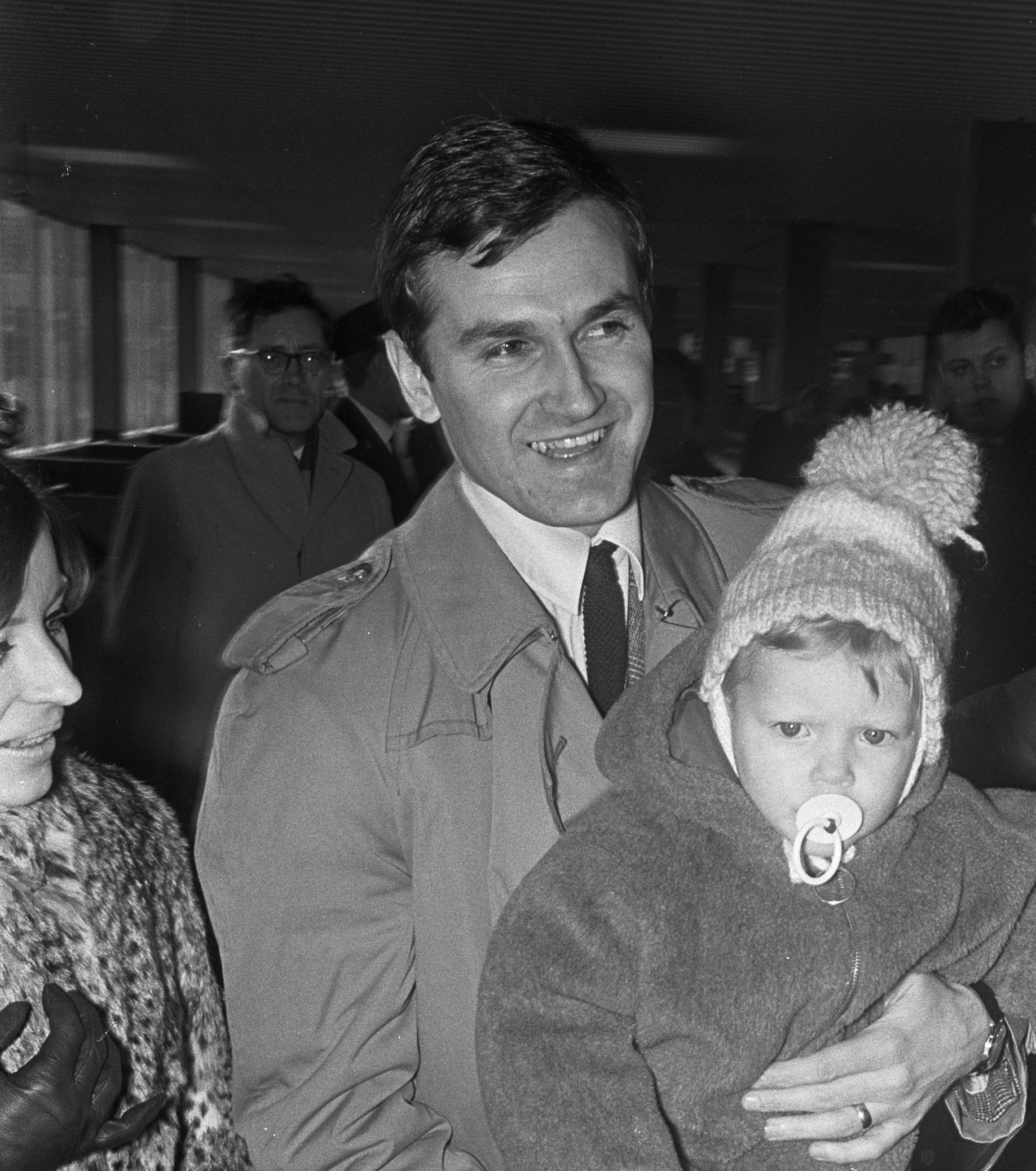 Aankomst Zweedse voetballer Inge Danielsen op Schiphol (voor Ajax)